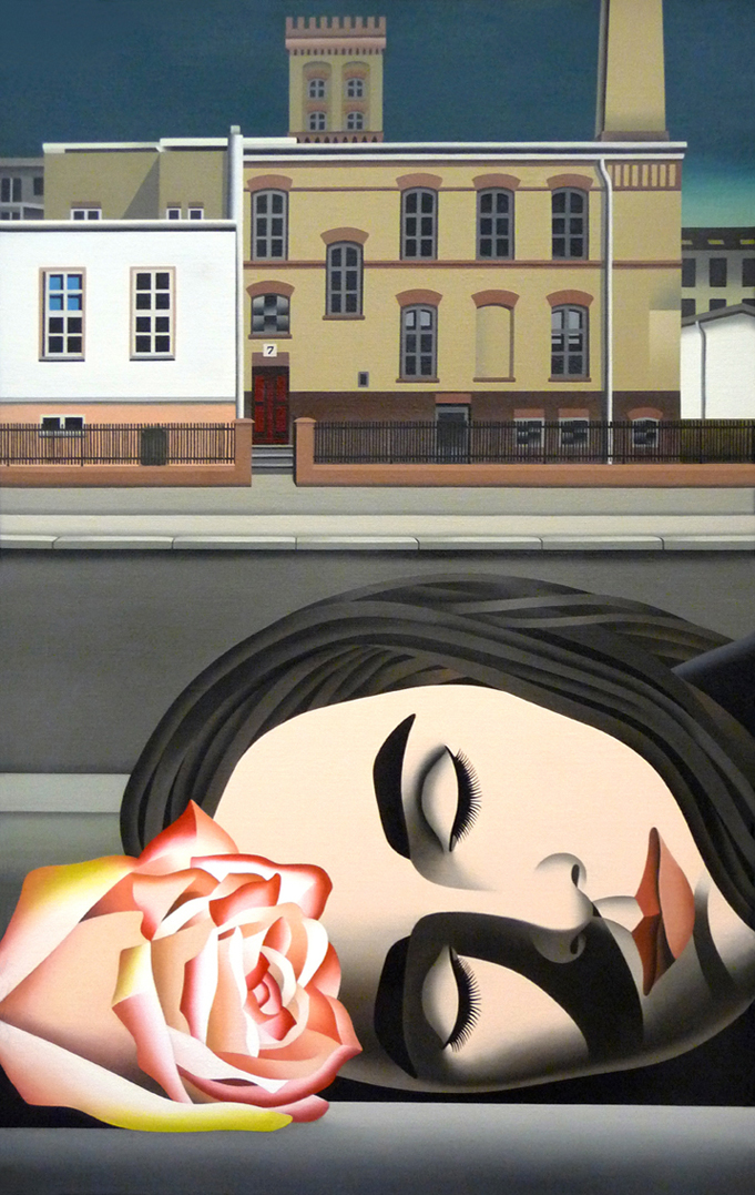 Jan Schüler, Belziger Straße, 1968 (Maina), 2012, Öl auf Leinen, 80 x 50 cm